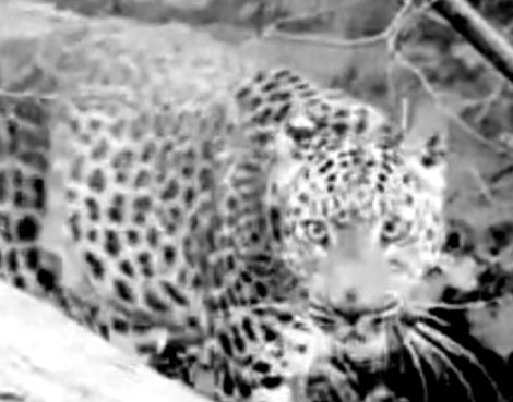 Belgian silent film.